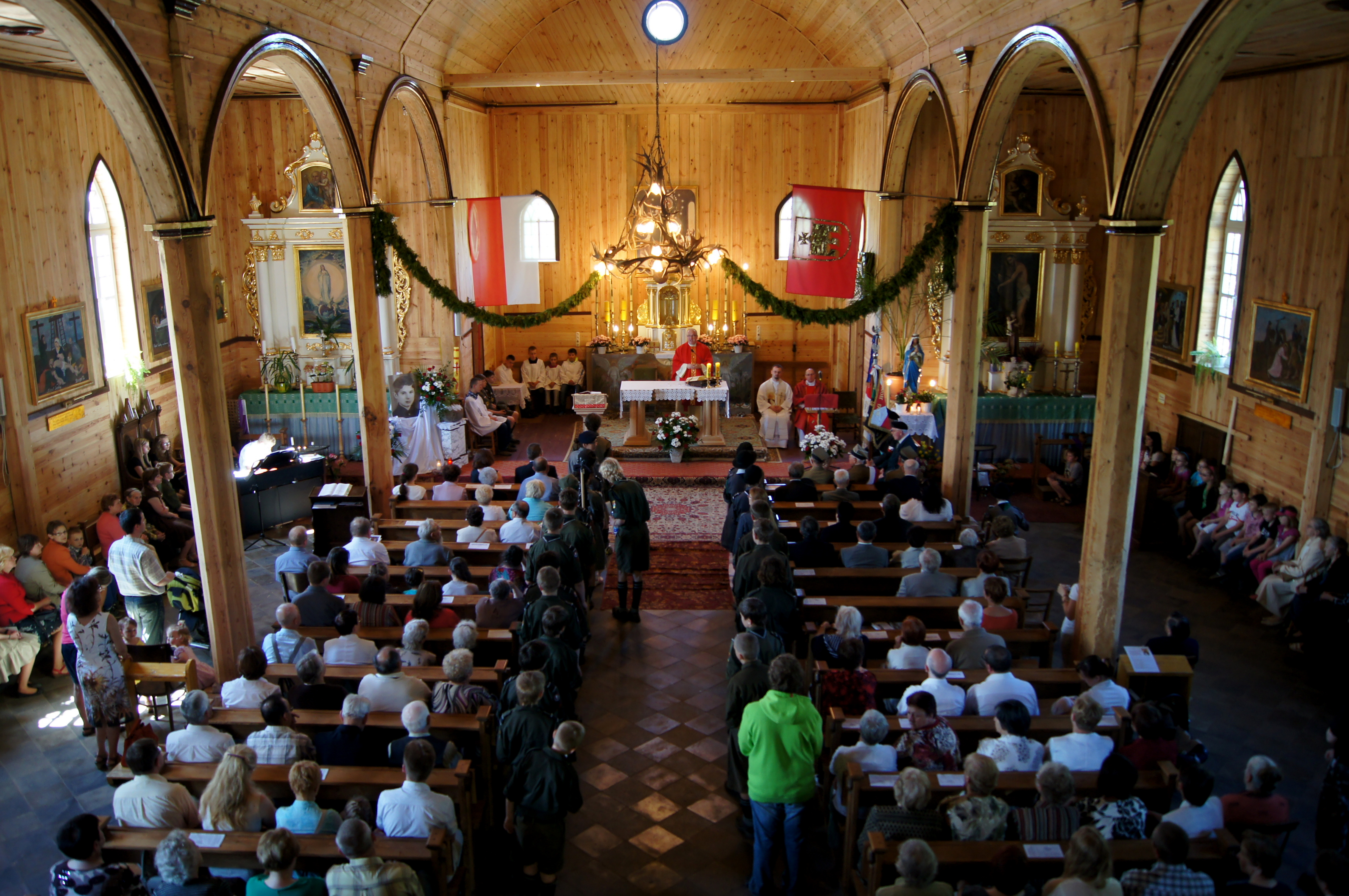 Kościół Wniebowzięcia NMP w Berżnikach: Msza Święta w czasie uroczystości odsłonięcia tablicy poświęconej Marianowi Piekarskiemu - 19 maja 2013 r.